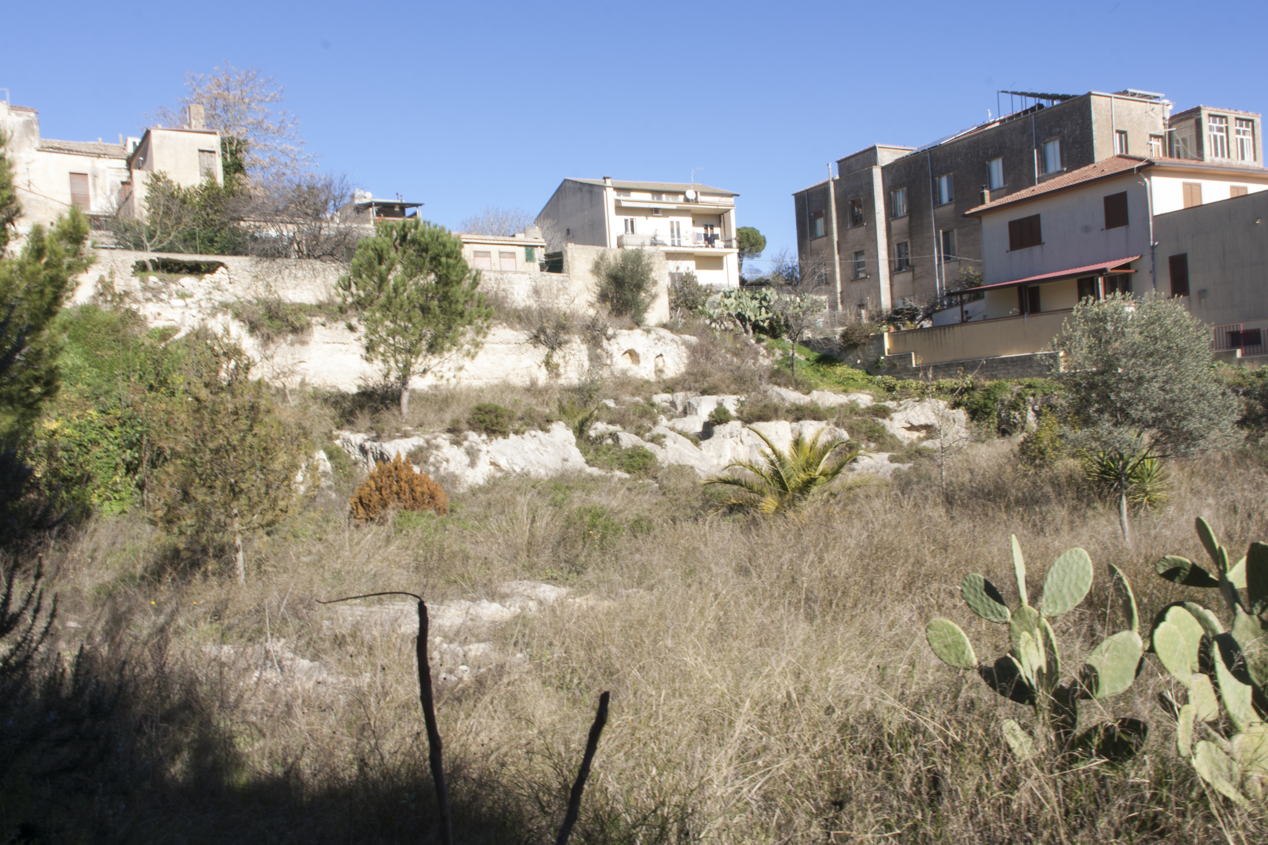 Necropoli di vigna della Signora